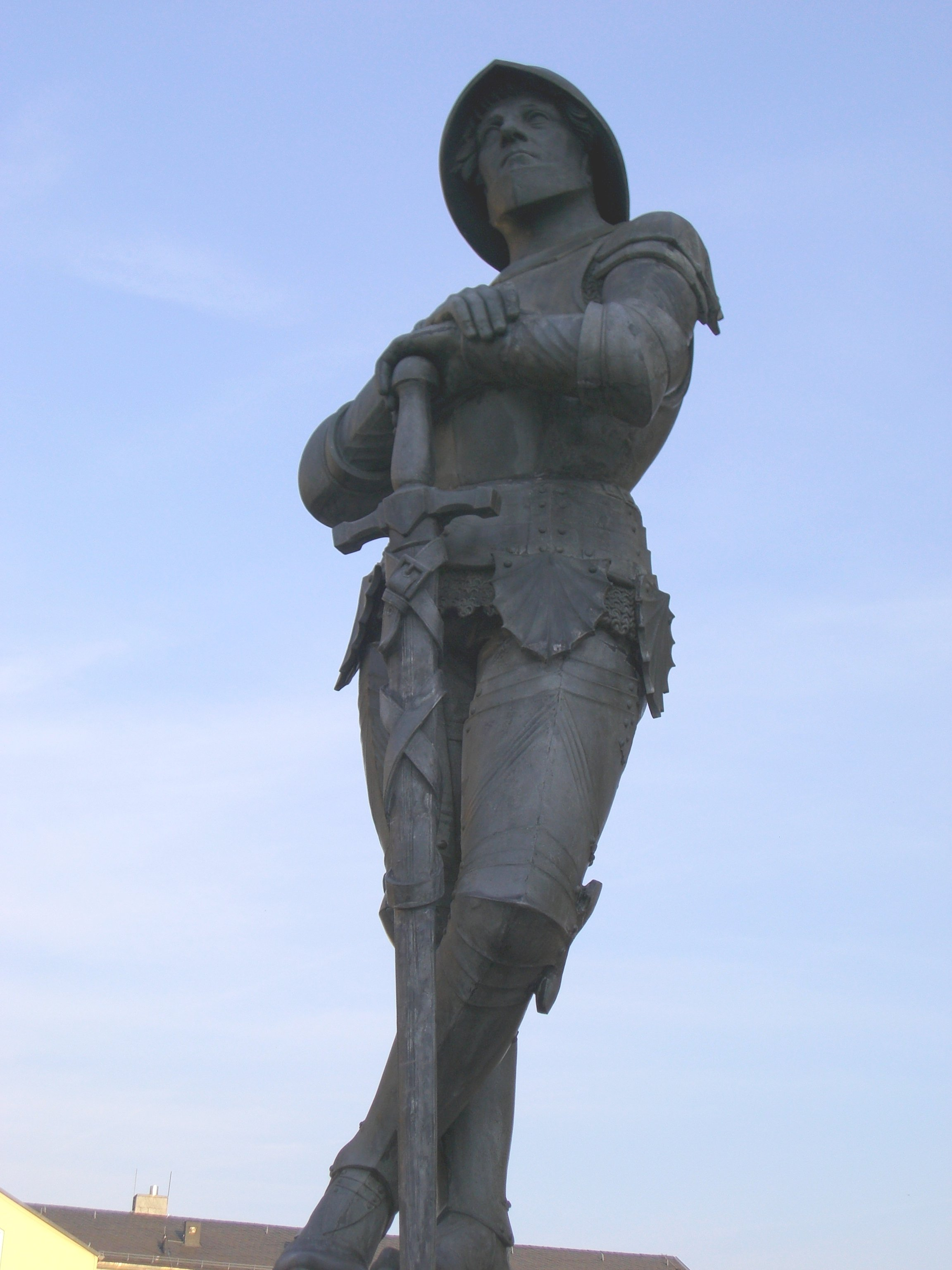 Statue von Ritter Hartmuth, Kronberg im Taunus.